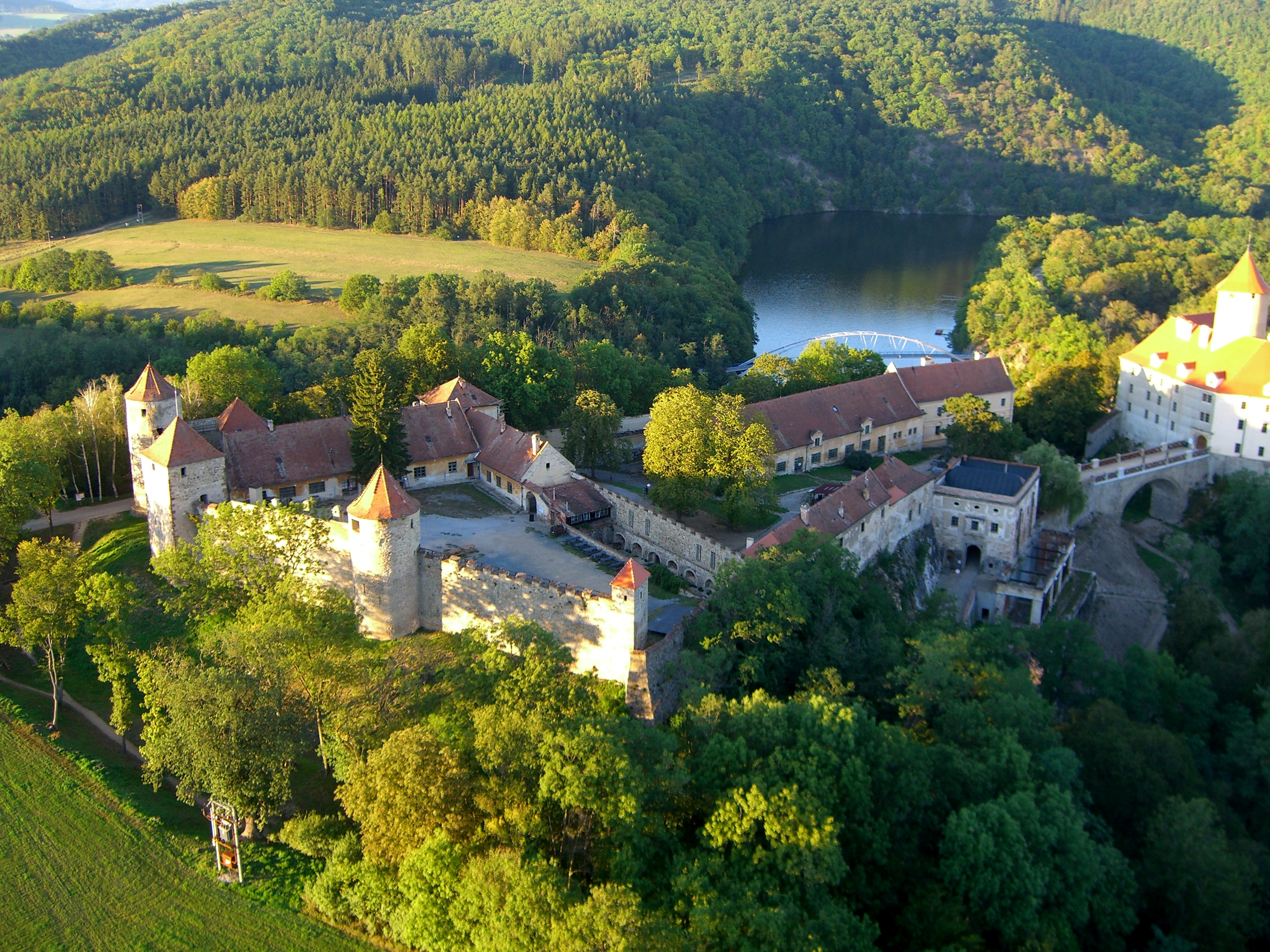 Hrad Veveří, pohled z horkovzdušného balónu.